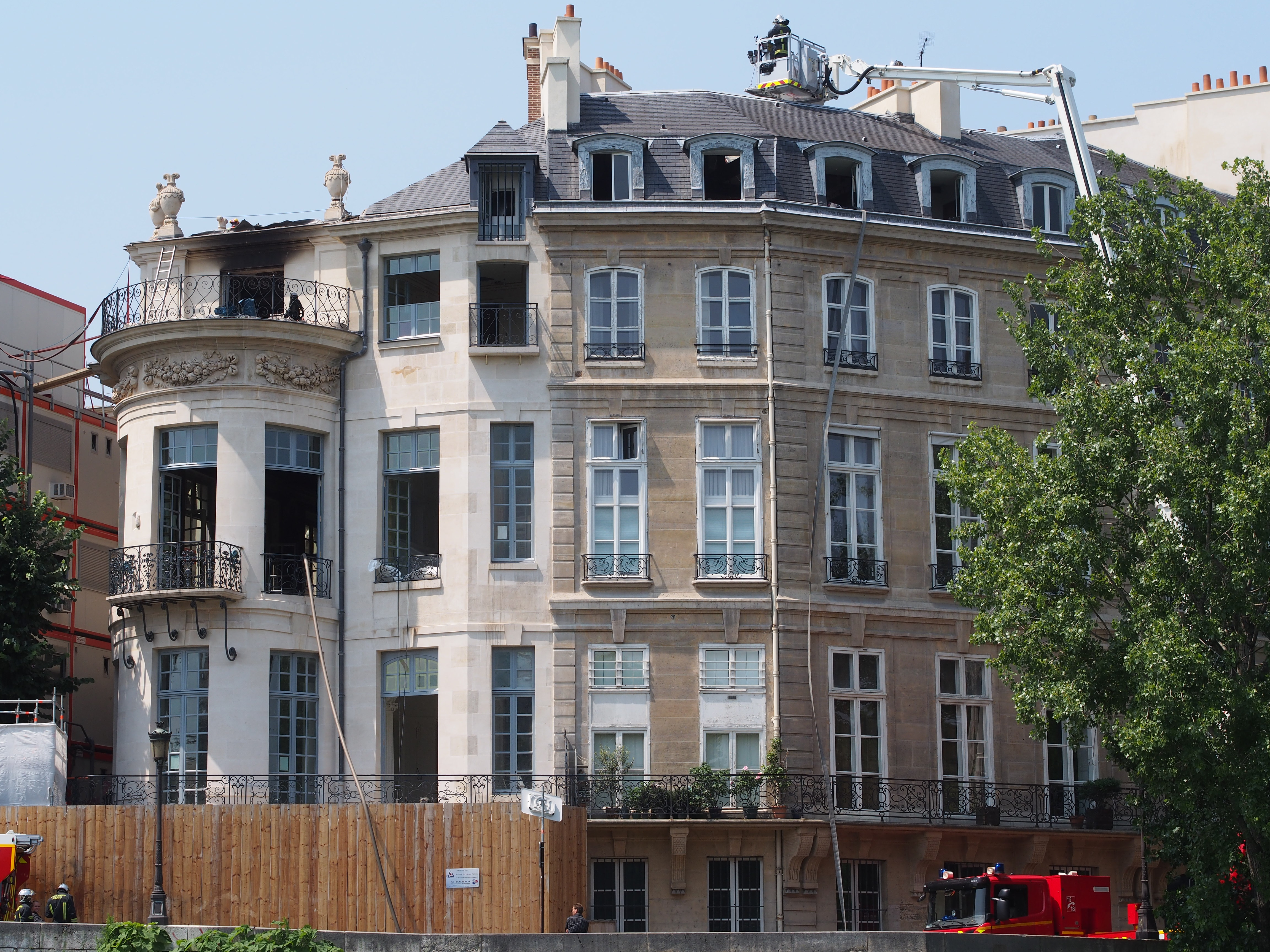 Hôtel Lambert, dont l'entrée se trouve au numéro 2 de la rue Saint-Louis-en-l'Île, à Paris. Ici, vu du côté du quai, après l'incendie de la nuit du 9 au 10 juillet 2013.